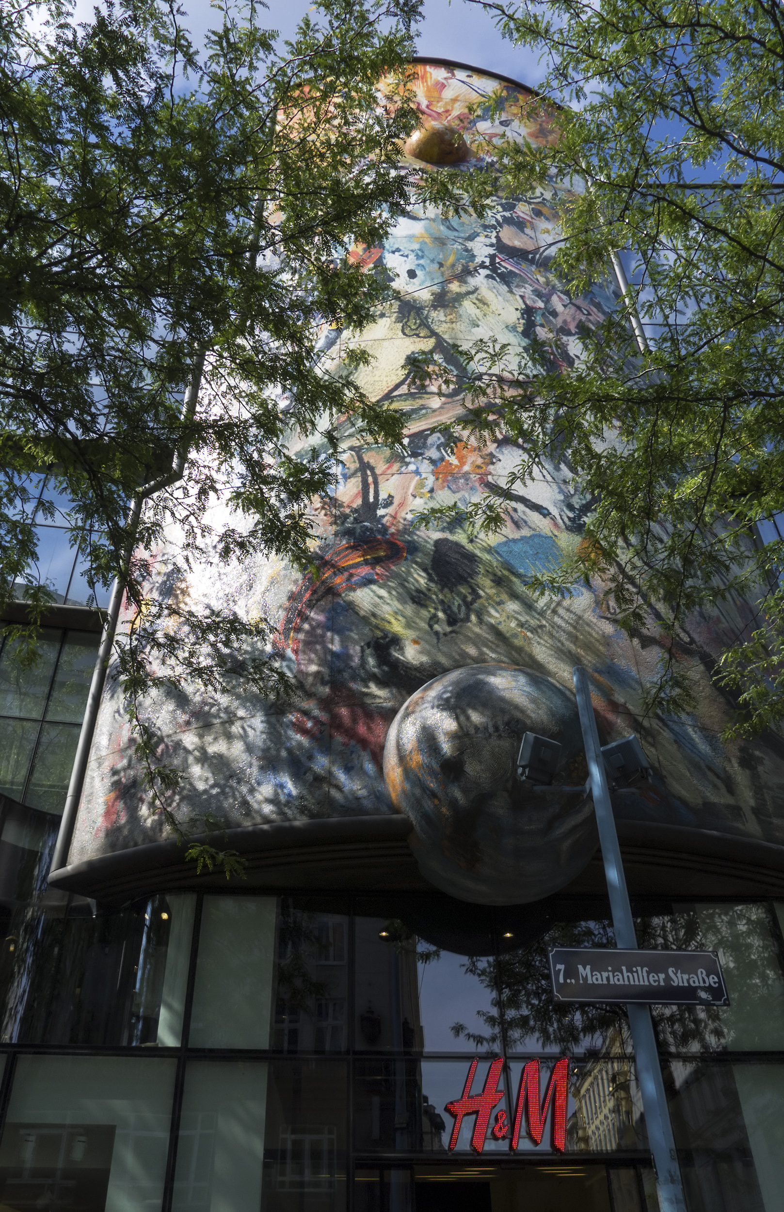 Kaufhaus H&M in der Mariahilfer Straße 78-80 in Wien 7